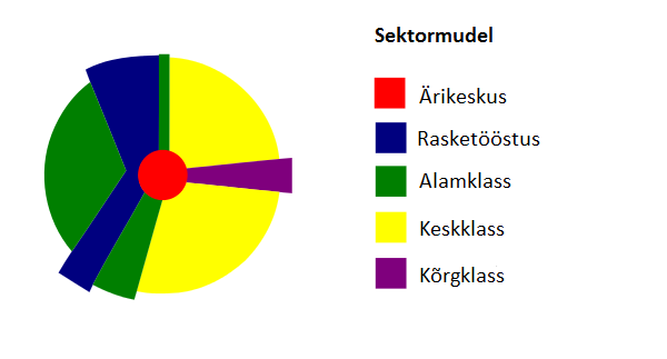 Hoyti maakasutuse mudel